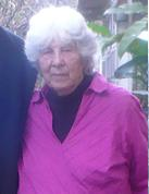 Imagen de la Gran Maestra nacional Carmen Daester. Es la líder de la Gran Logia Femenina de Memphis Misraim de Argentina, cuya sede central funciona en Tucumán.